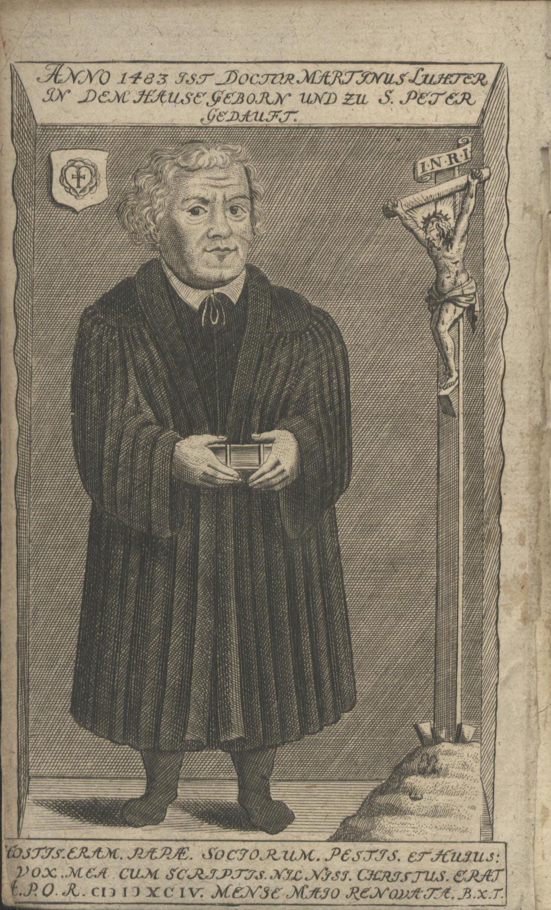 Der Unverbrannte Luther als Illustration zu Schöpffers Werk Lutherus non combustus